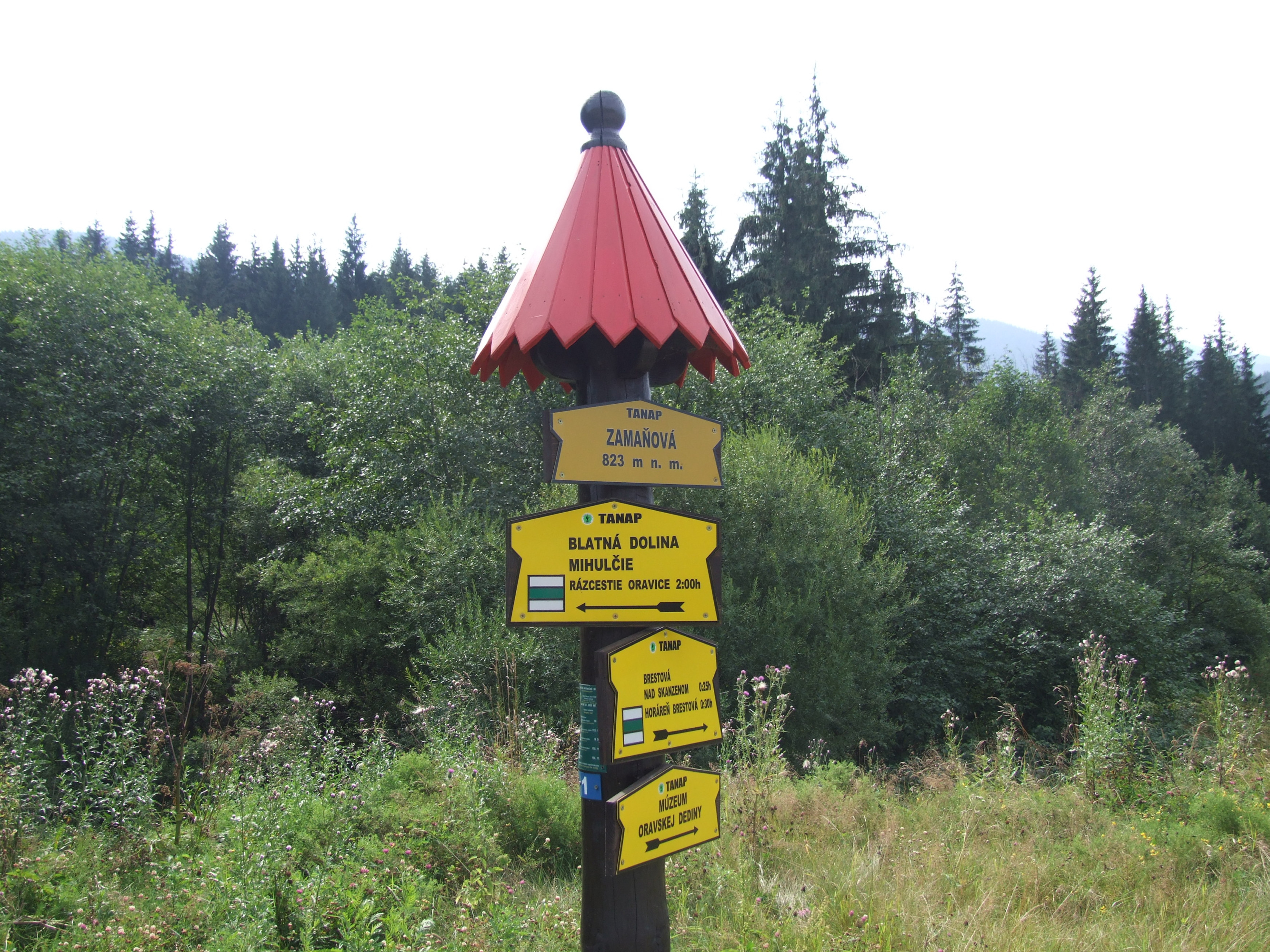 Rozdroże Zamaniowa w Dolinie Błotnej